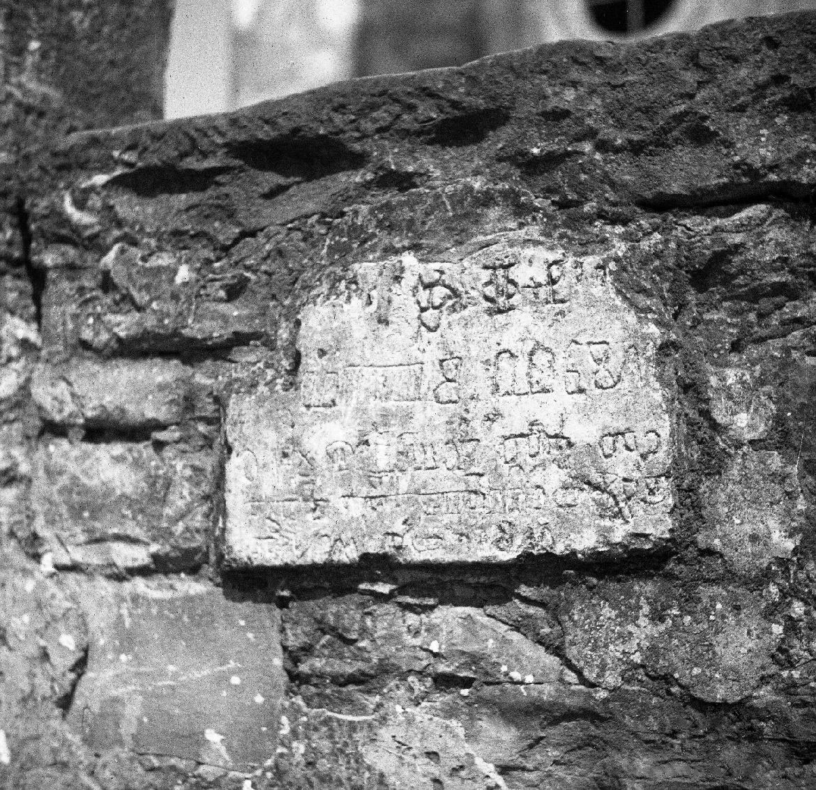 Puče, plošča z glagolskim napisom, vzidana v zidu pred cerkvijo.